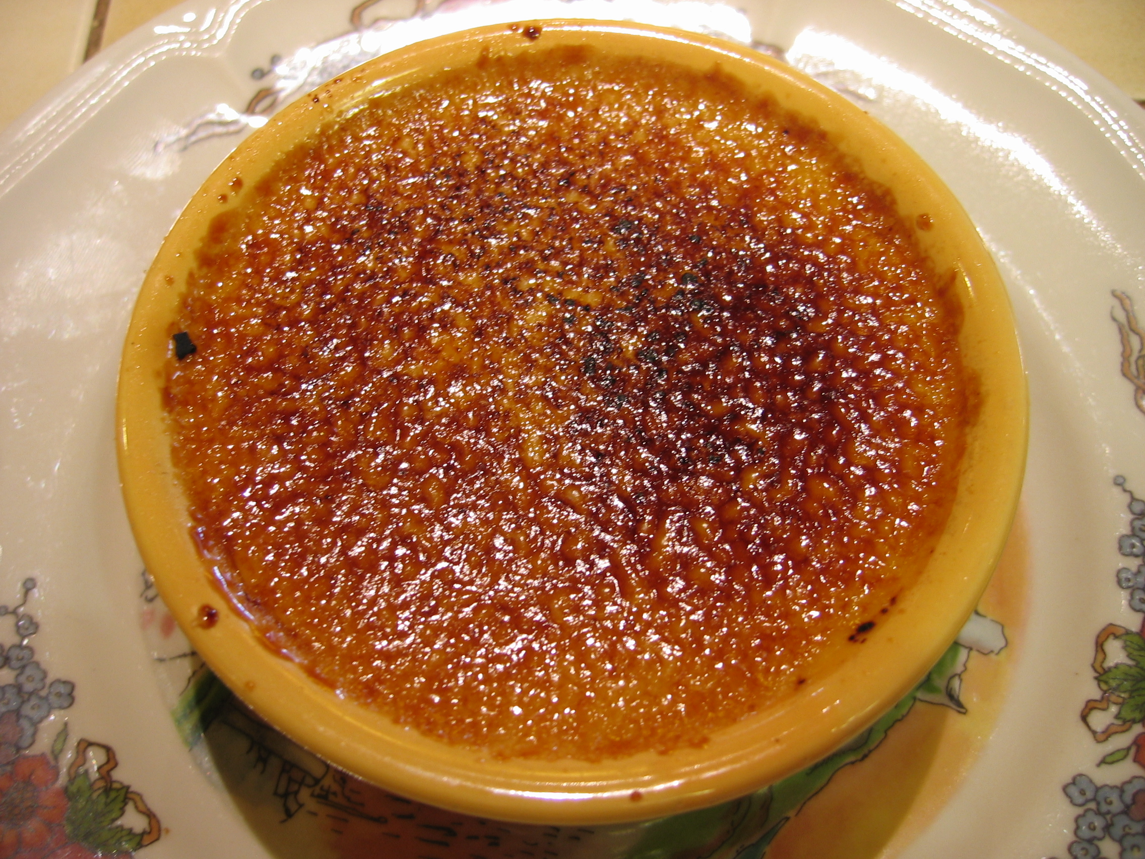 Creme brulée